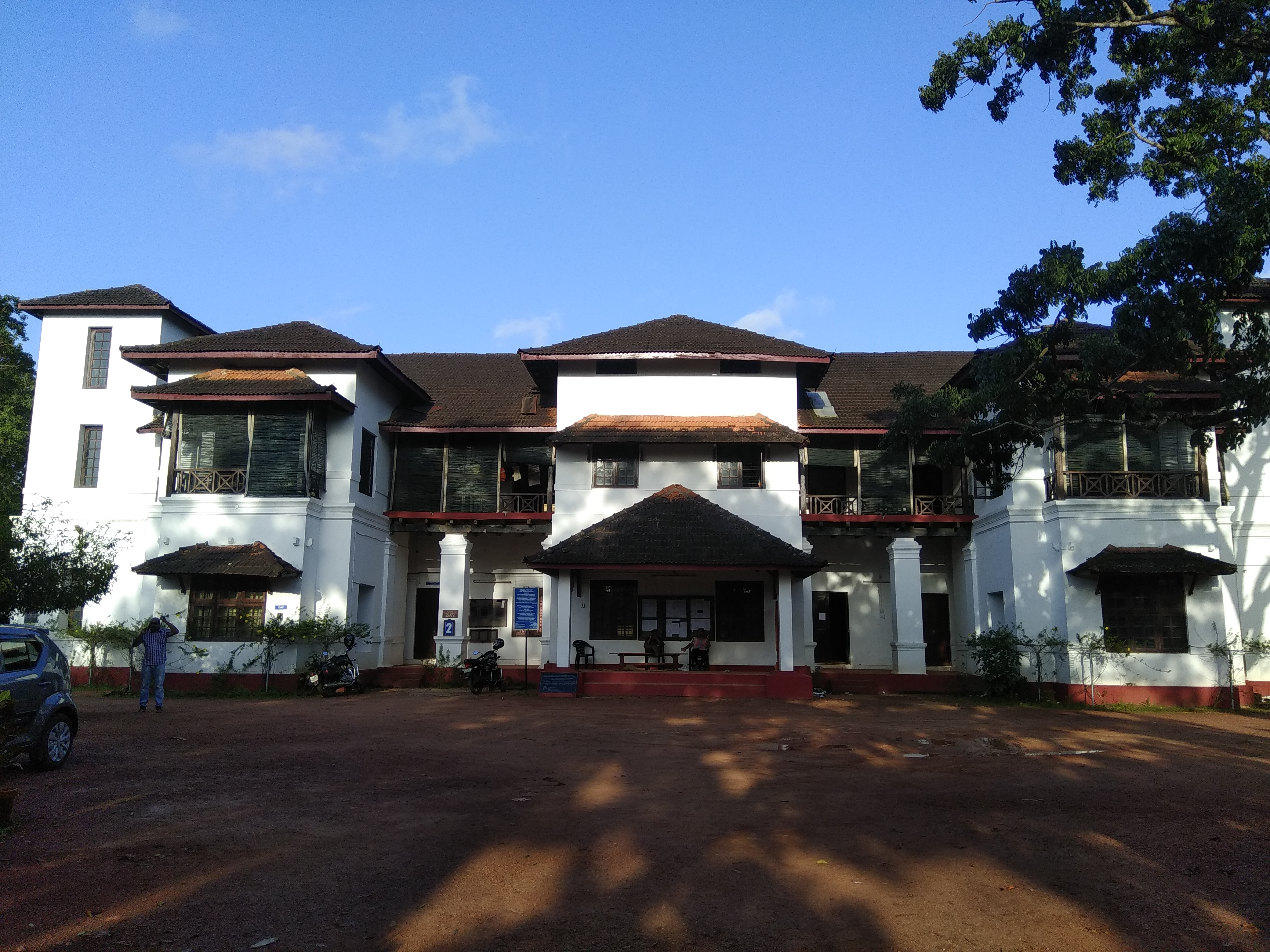 Kacheri Malika at UC College, Aluva, Kerala, India